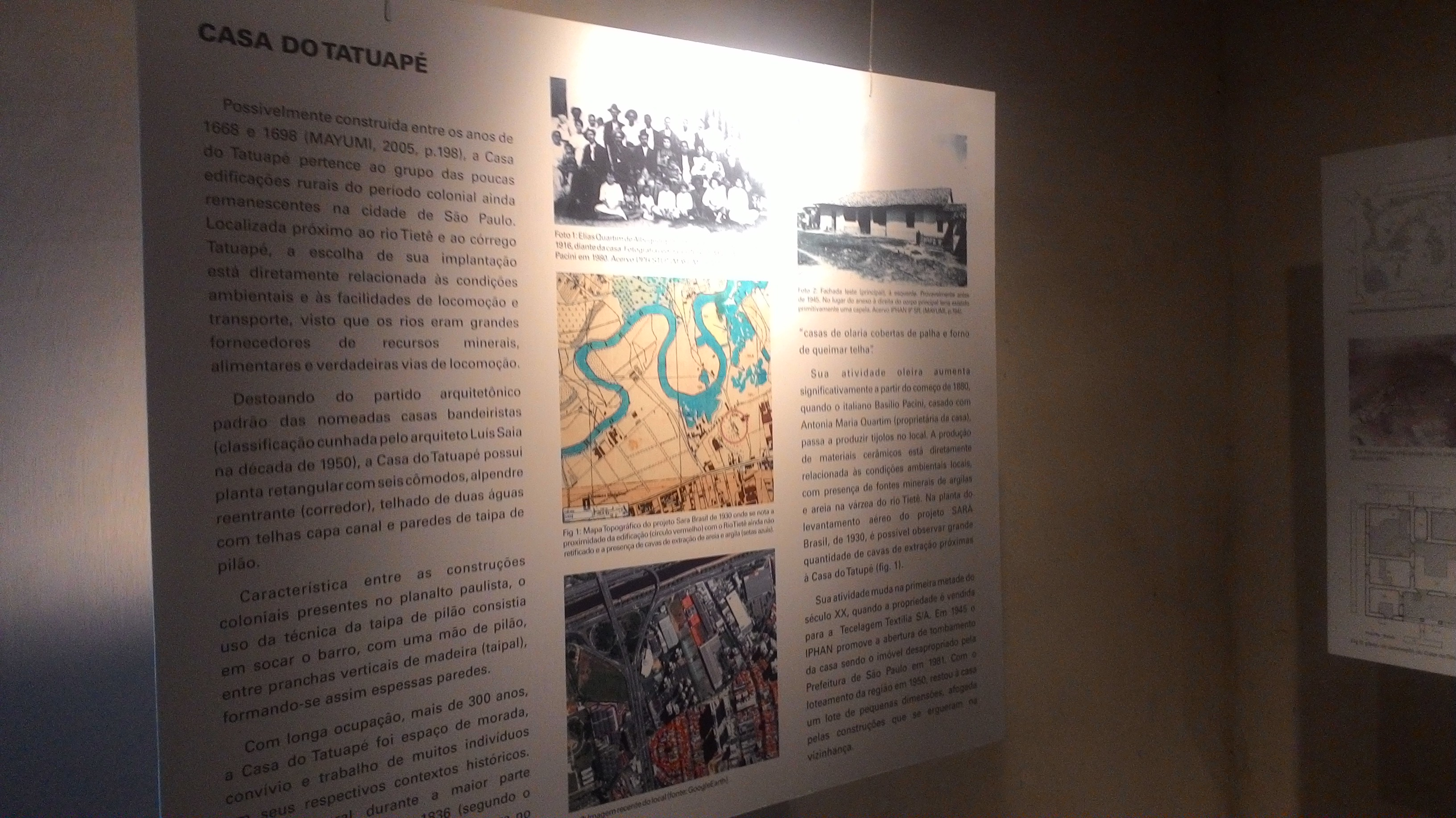 Painel com informações históricas sobre a Casa do Sítio Tatuapé, em São Paulo (SP), Brasil.